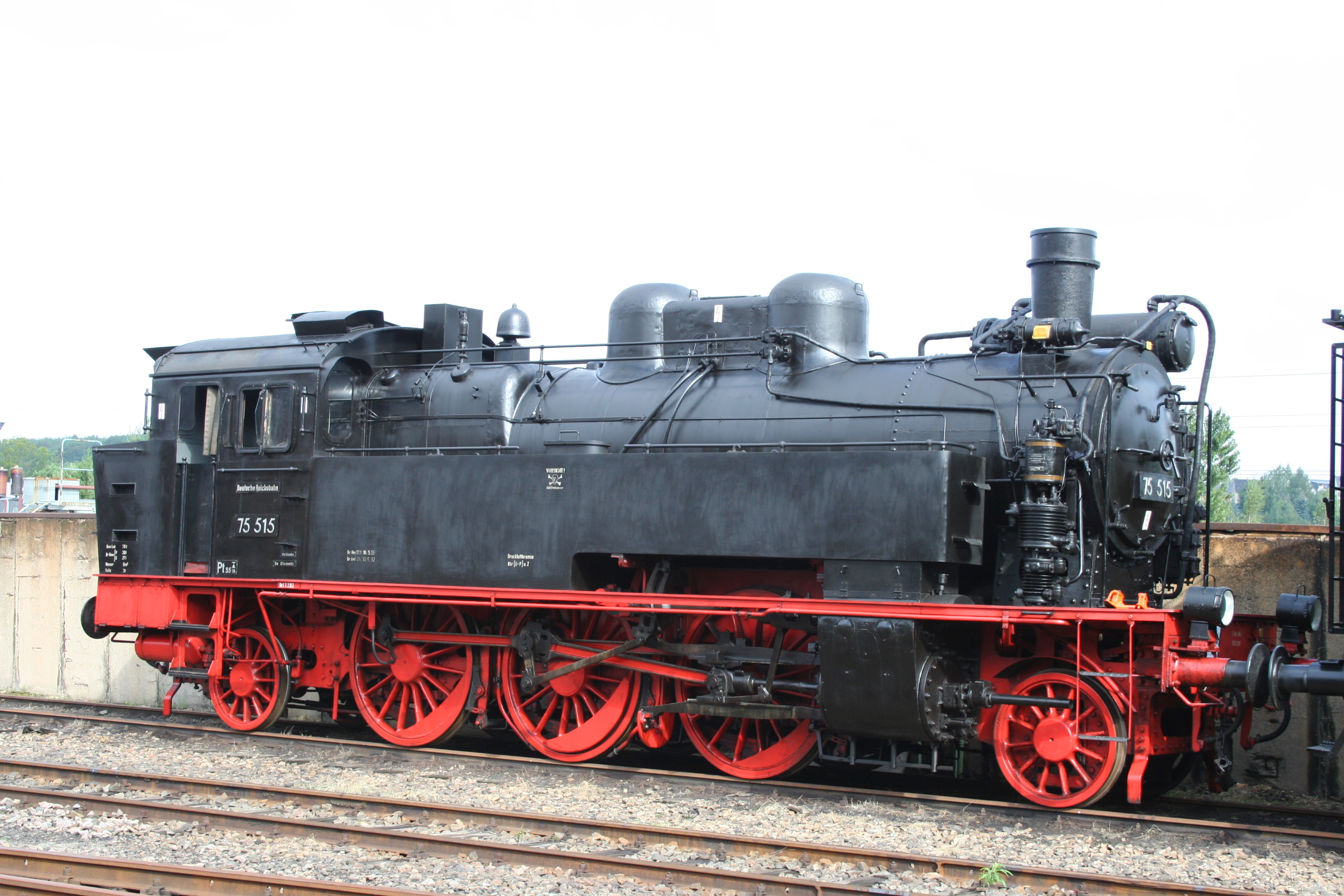 Dampflokomotive 75 515 im Sächsischen Eisenbahnmuseum Chemnitz-Hilbersdorf 23.08.06